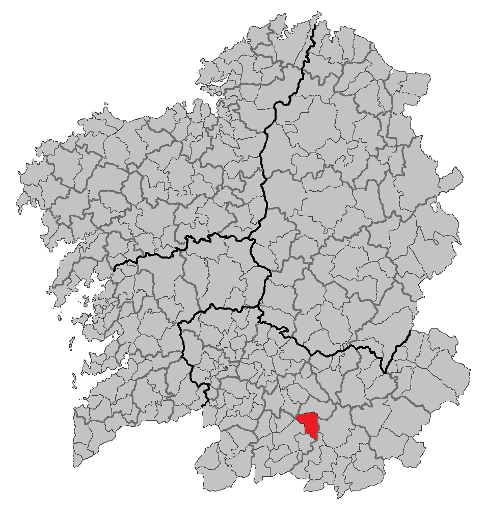 Mapa coa localización do concello de Sarreaus.